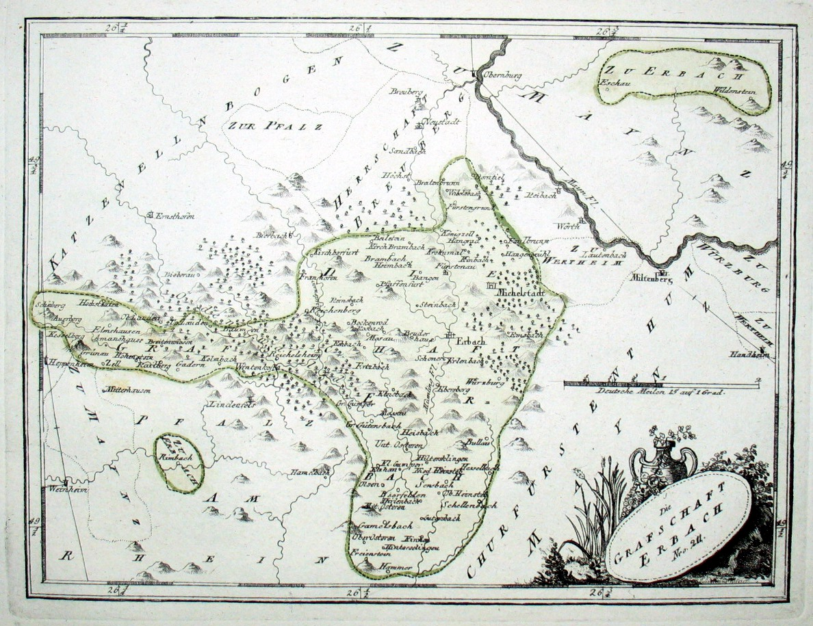 Die Grafschaft Erbach. Nro. 211. Kolorierter Kupferstich